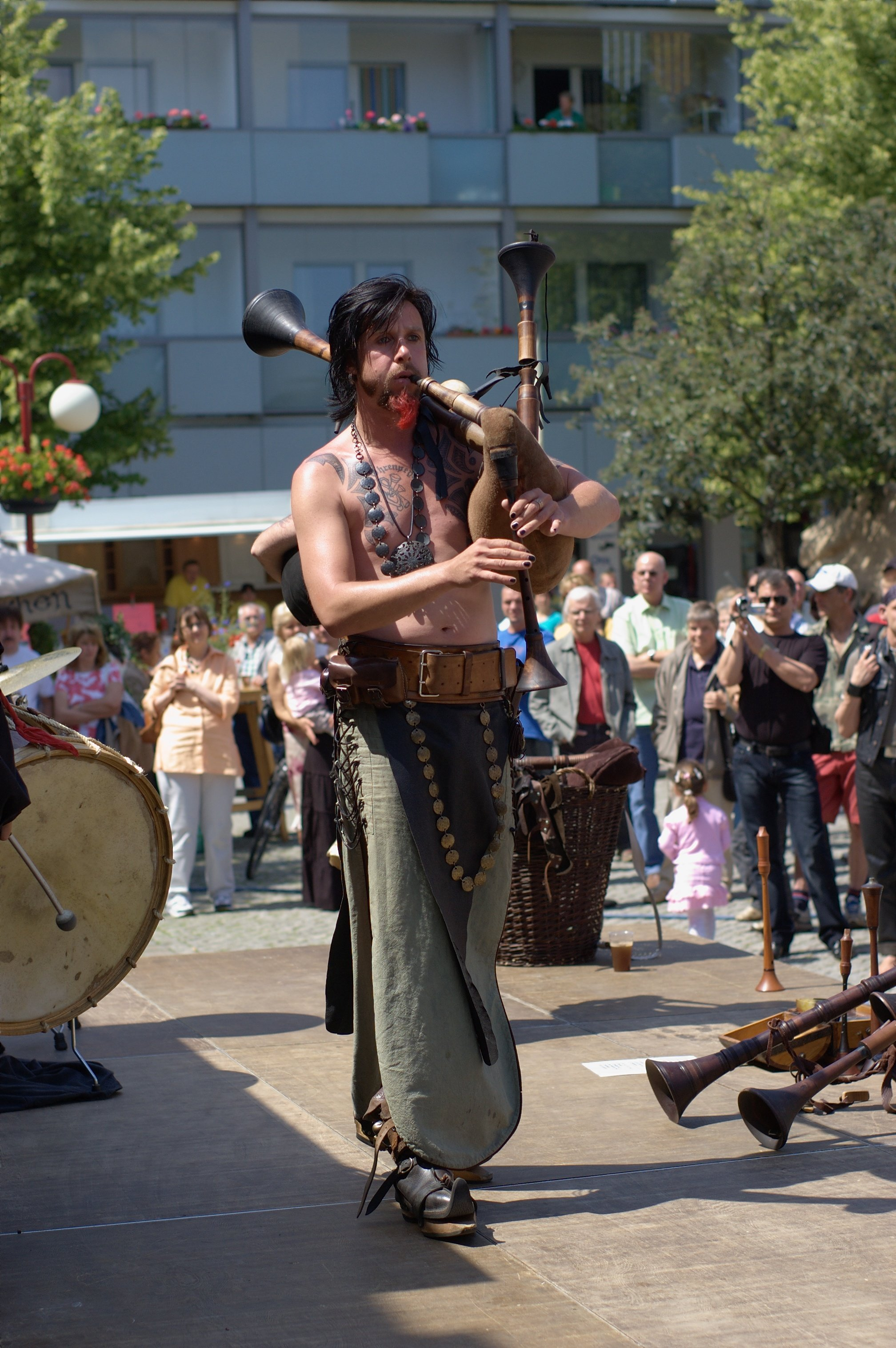 Hussitenfest Bernau 2009, Ohrenpeyn